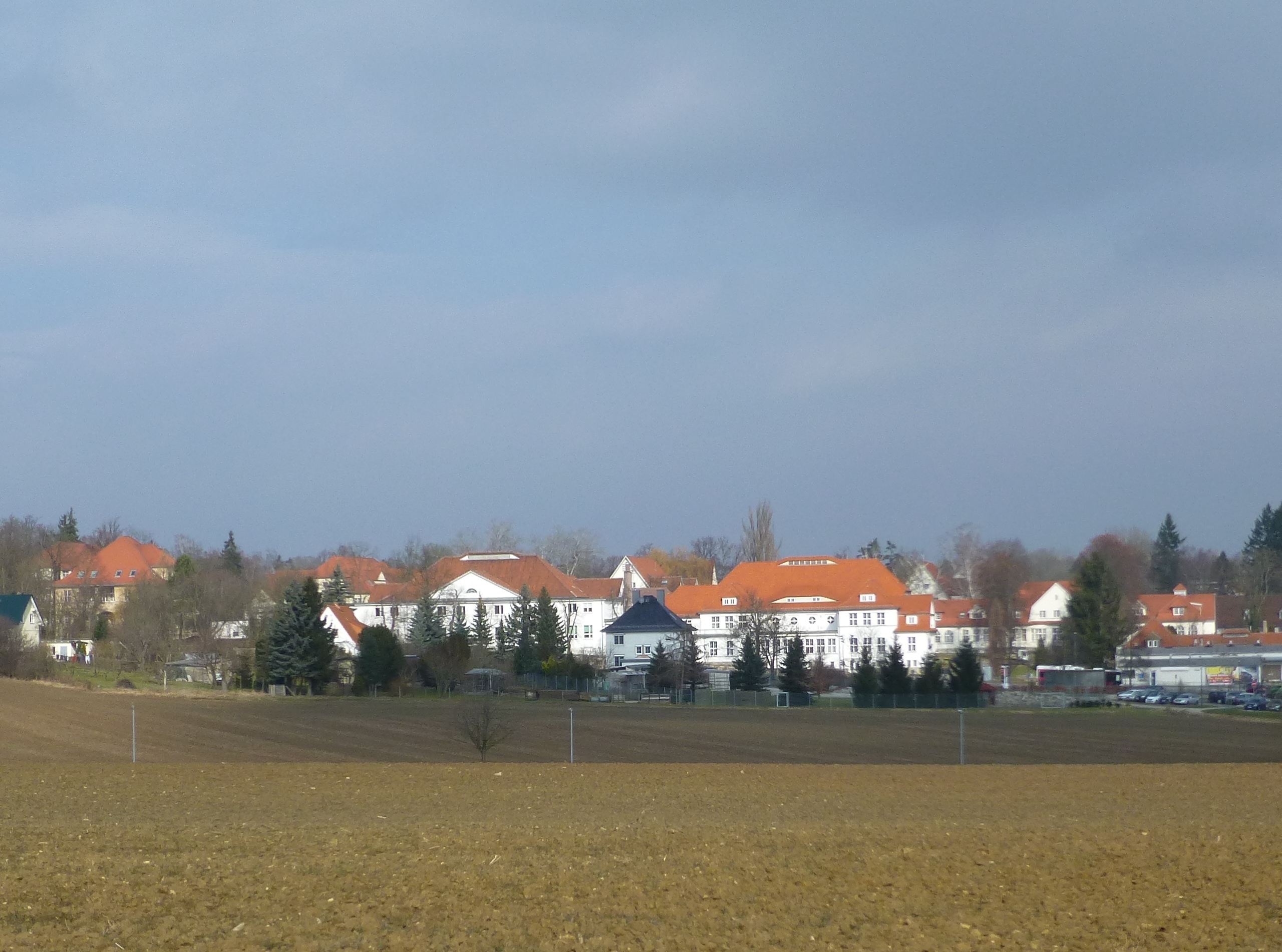 Blick nach Pfafferode mit Klinikum